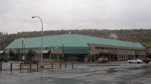 CN Center